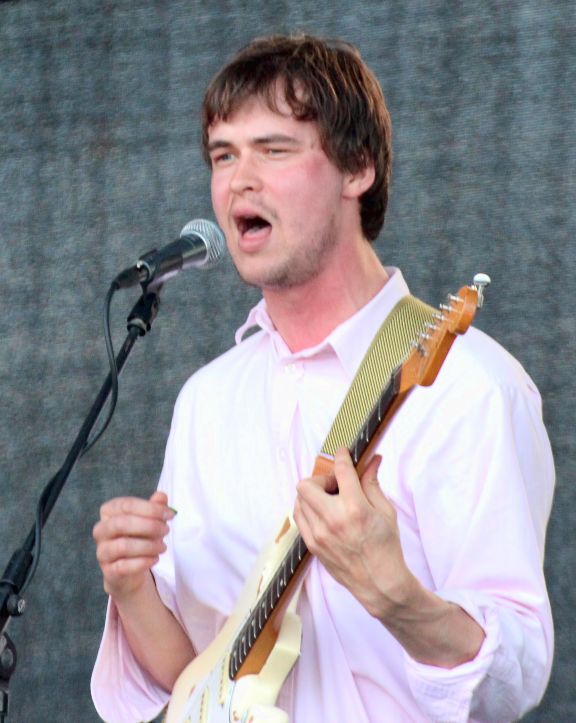 Marten Kuningas esinemas Tallinna Merepäevadel.